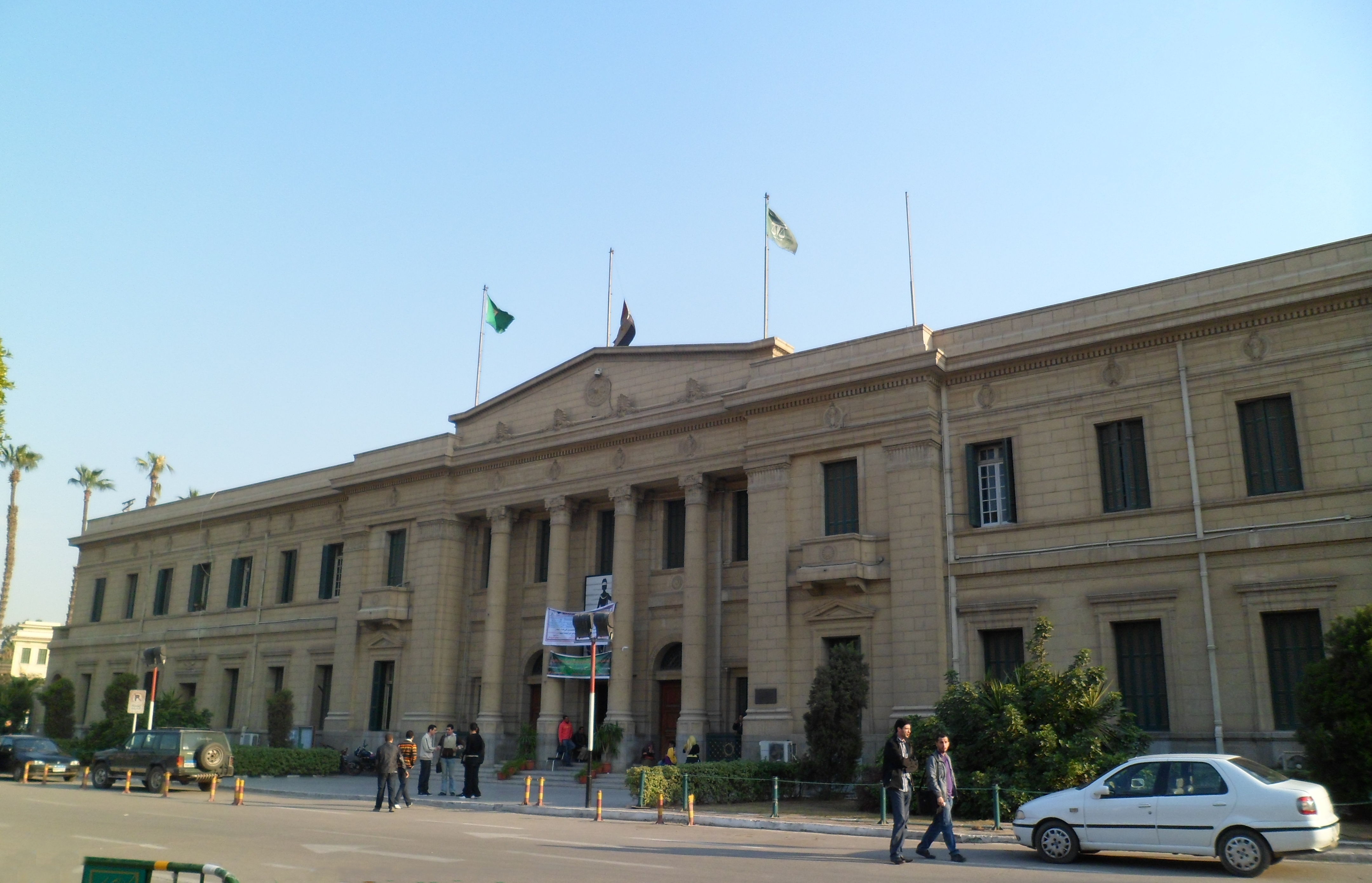 كلية الحقوق، جامعة القاهرة.